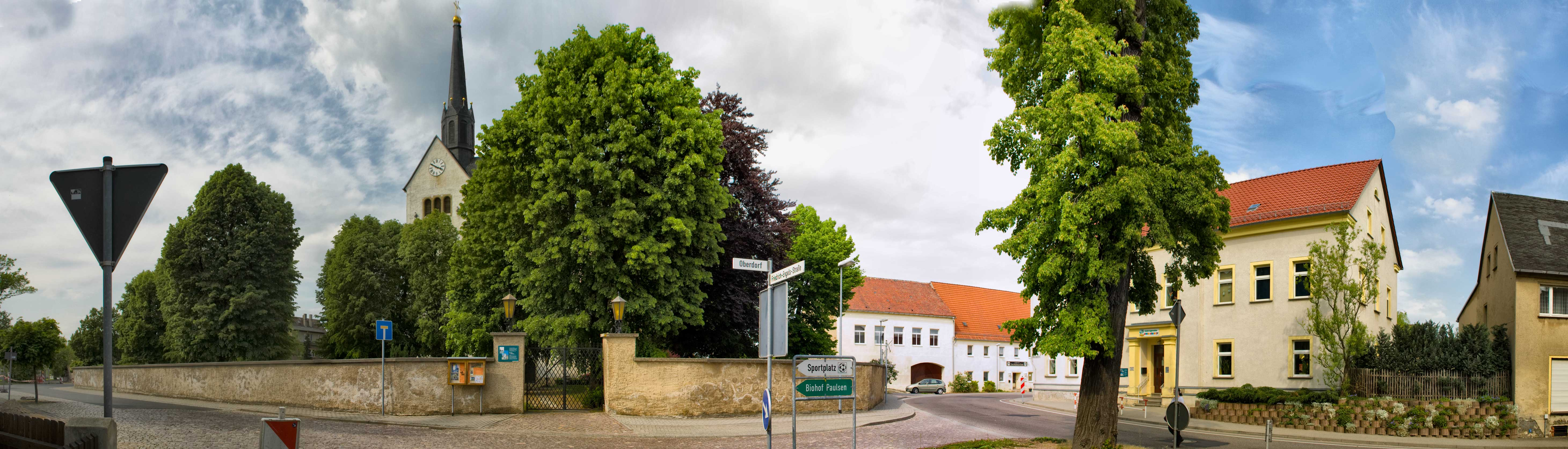 Das Ortszentrum von Deutsch-Luppa, einem Ortsteil von Wermsdorf mit der ev.-luth. Kirche